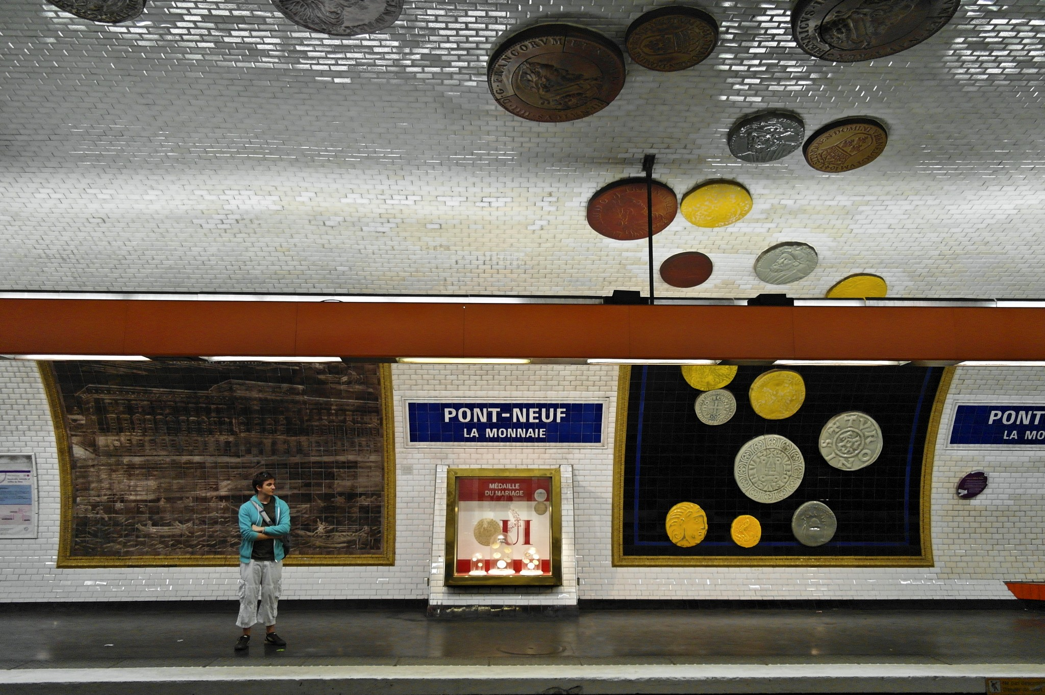 Pont Neuf (Paris Metro)